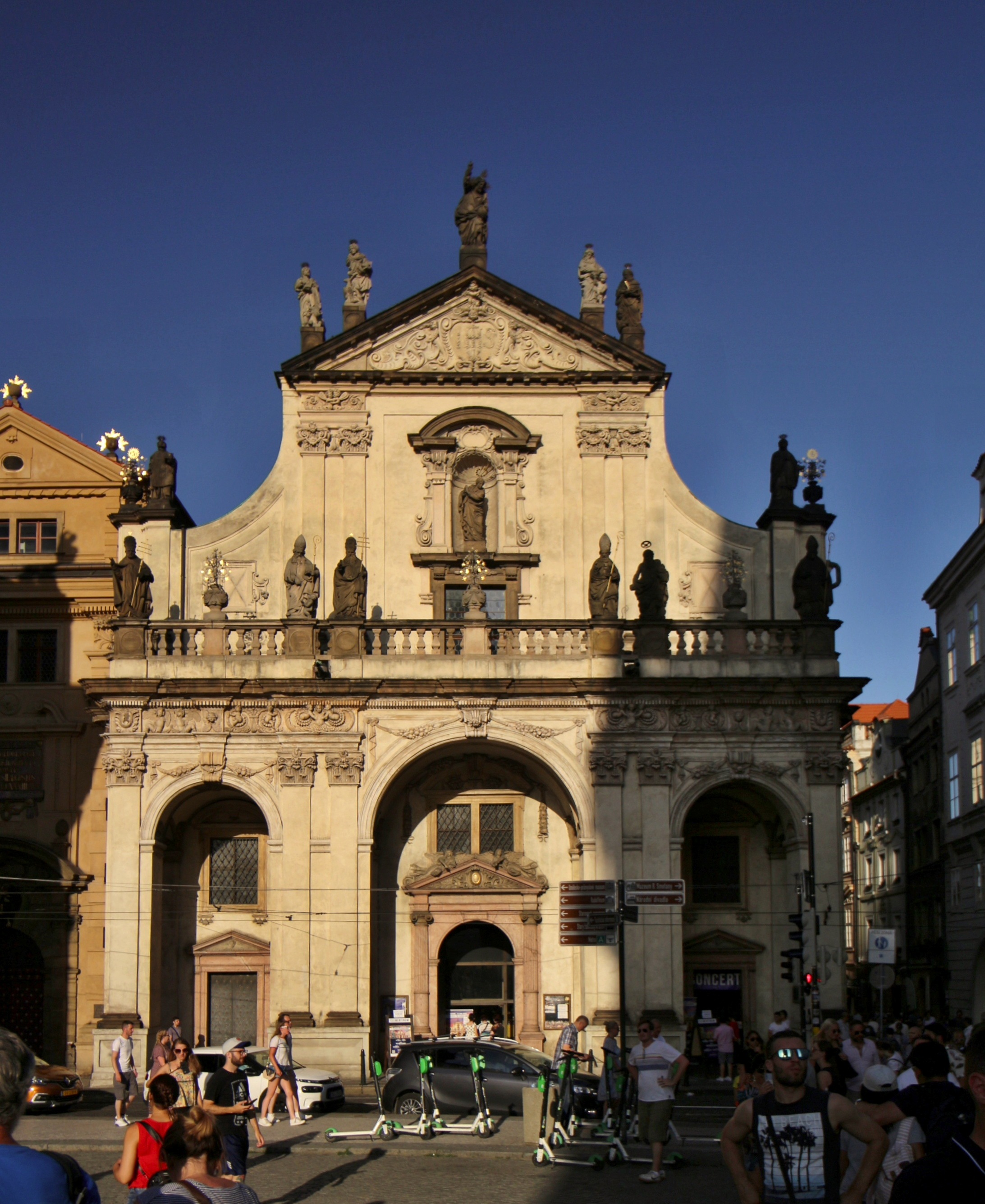 Křižovnické náměstí